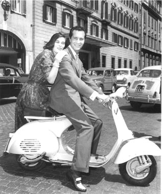 Lucia Bosé in compagnia del marito Luis Miguel Dominguìn a Roma Licensing Categoria:Immagini di Lucia Bosè